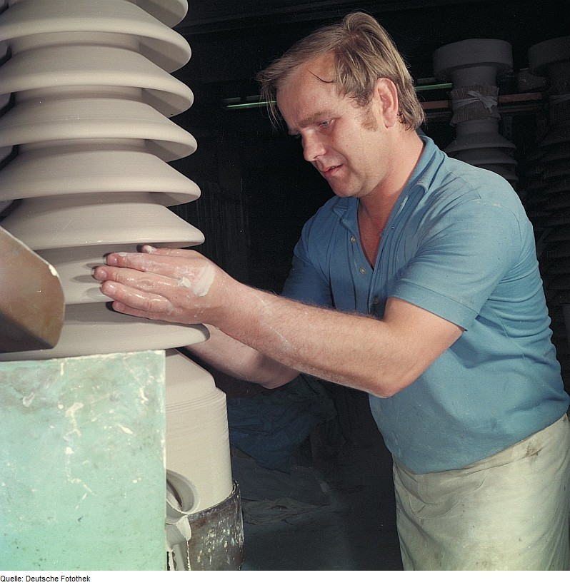 Original image description from the Deutsche Fotothek Facharbeiter für Sintererzeugnisse